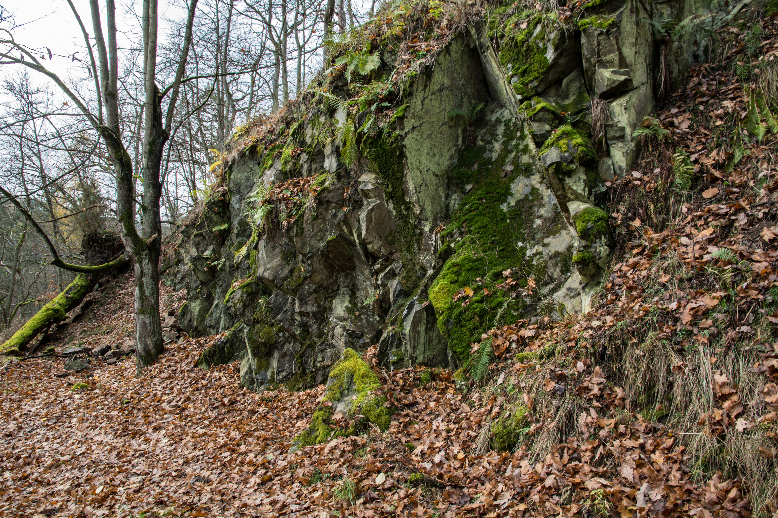 PR Pavlovická stráň